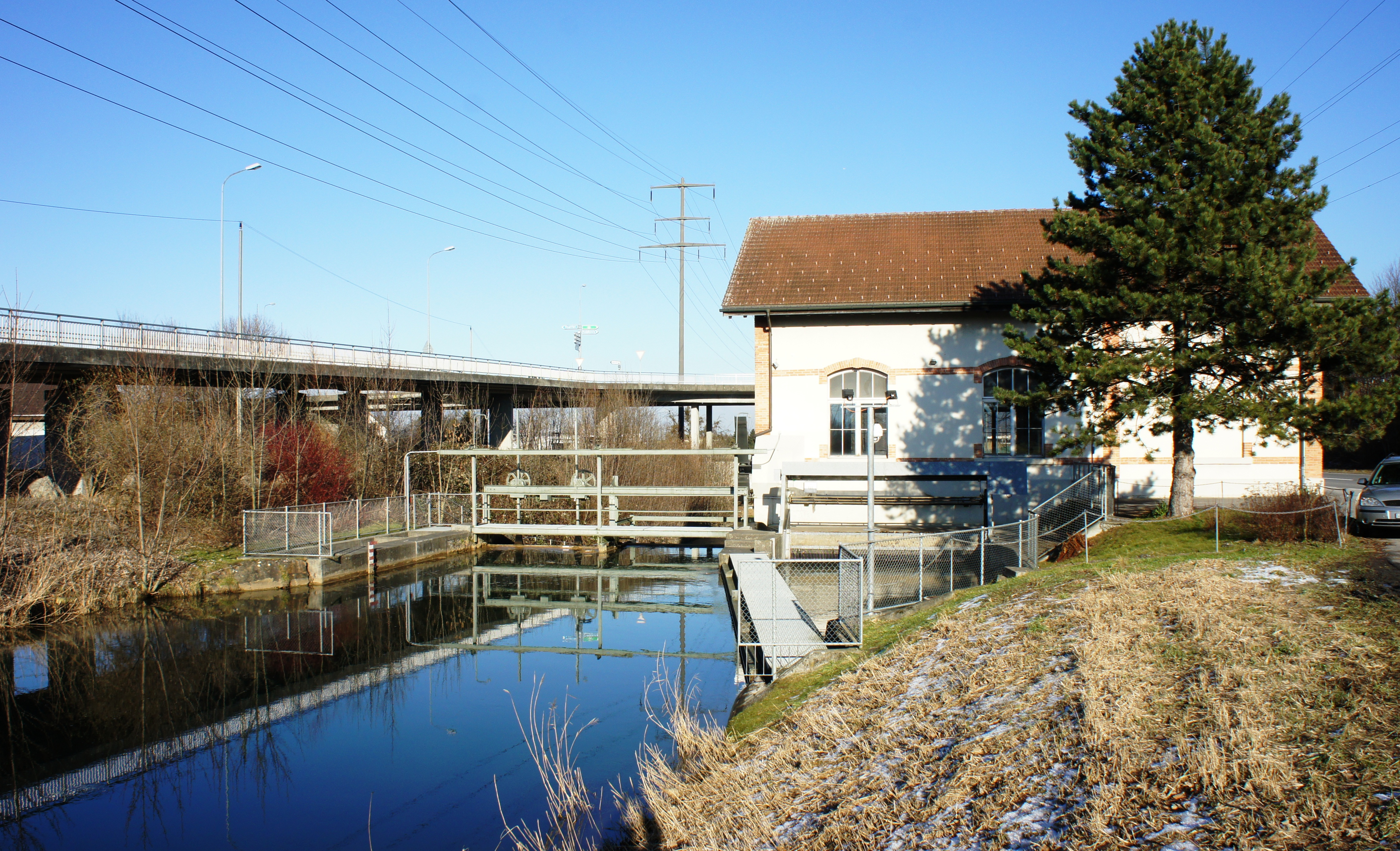 Blick aus Südwesten auf die Zentrale Oberriet der Rheintaler Binnenkanalkraftwerke. Rechts das Kraftwerk und in der Mitte das Wehr. Links am Bildrand ist die Rampe der Verbindungsstrasse Industrie Rüthi und Industrie Oberriet zur Autobahnzufahrt und zum Zollamt Oberriet-Meiningen zu erkennen. Links dahinter verläuft parallel die Eisenbahnlinie Altstätten-Buchs.